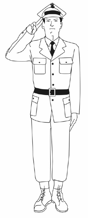 Oddawanie honorów (w nakryciu głowy) w Wojsku Polskim i w innych polskich służbach mundurowych